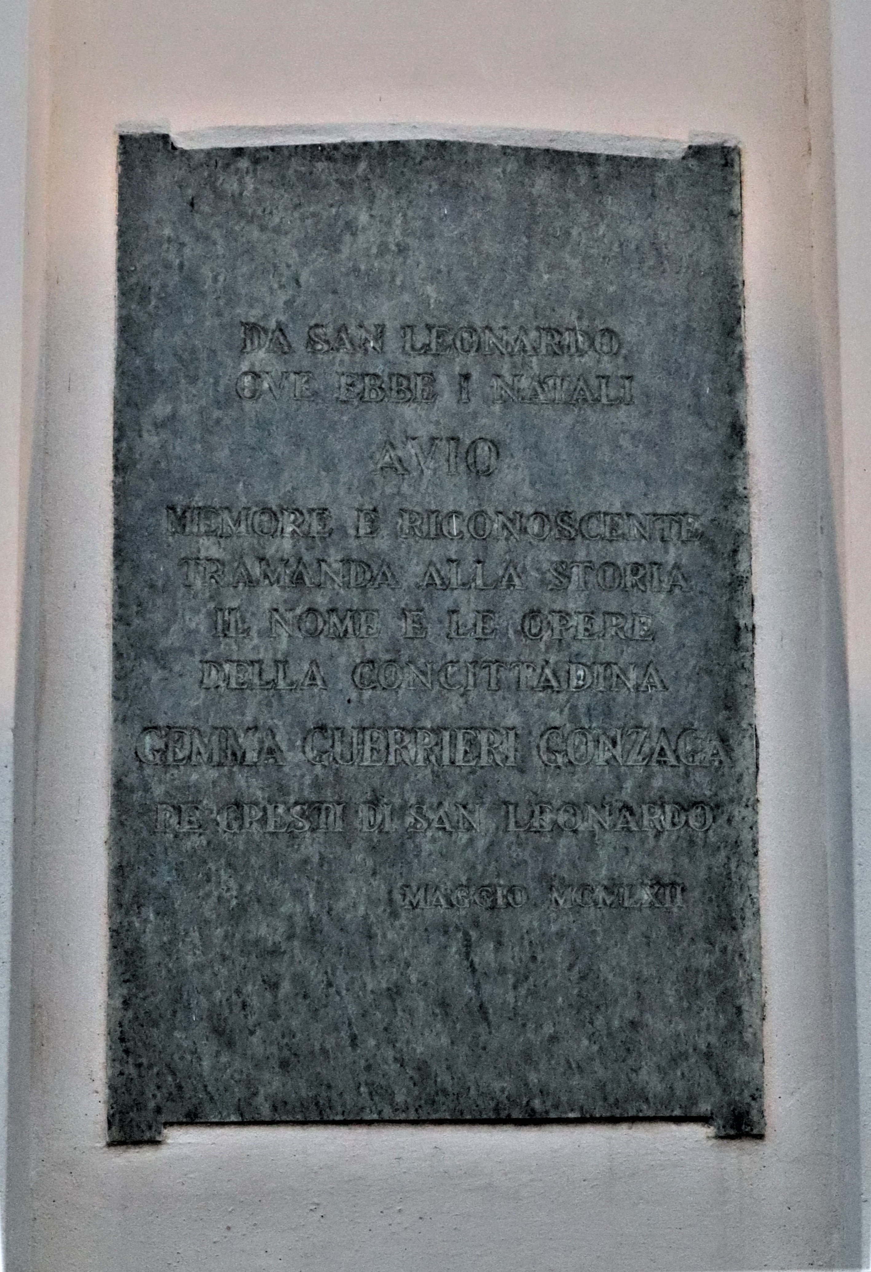 chiesa di San Leonardo in Sarnis, Borghetto sull'Adige, Lapide sulla facciata.